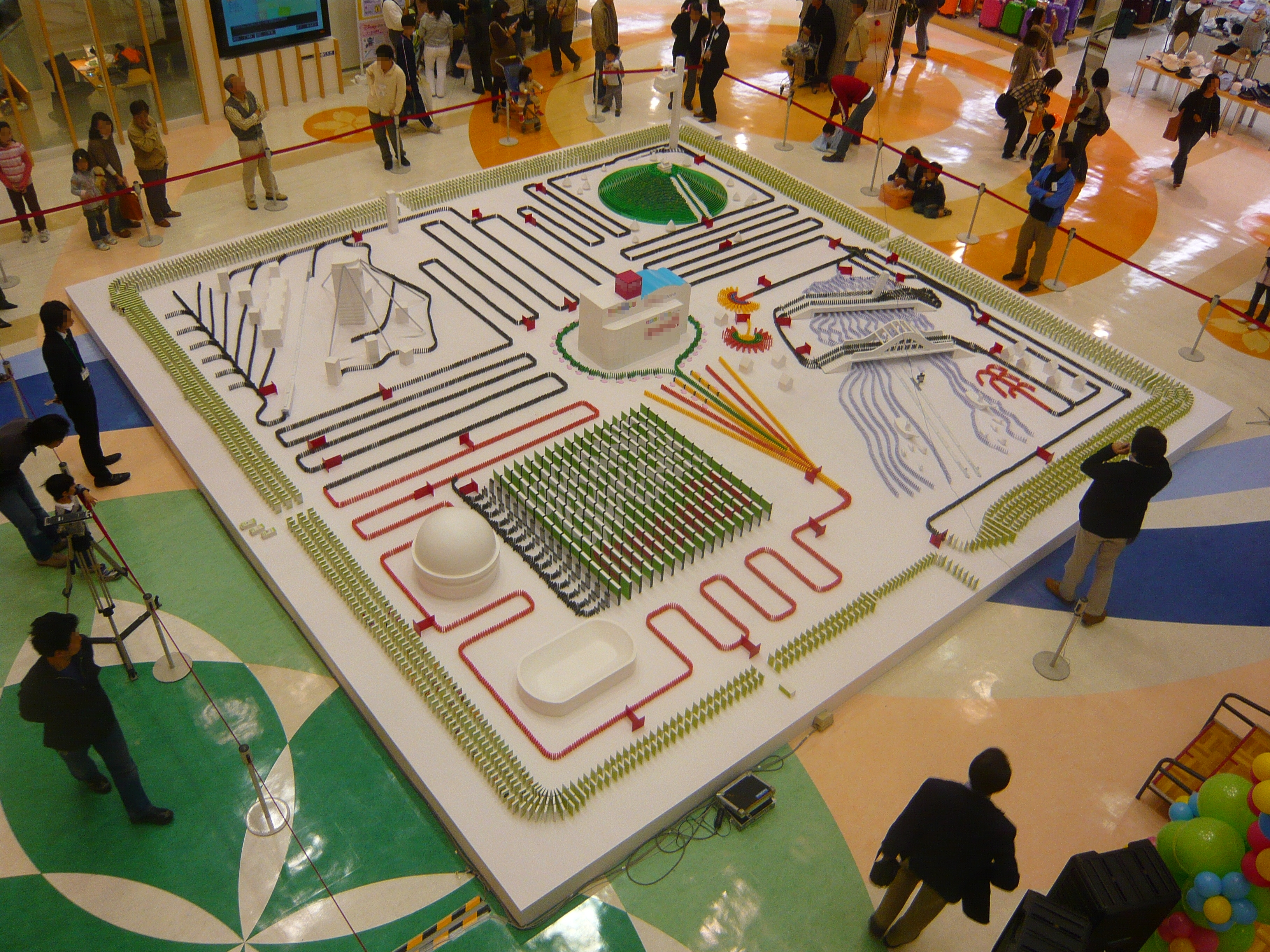 Domino effect ドミノ倒し,Gifu,Gifu,Japan（岐阜県岐阜市）のw:ja:マーサ21で撮影。